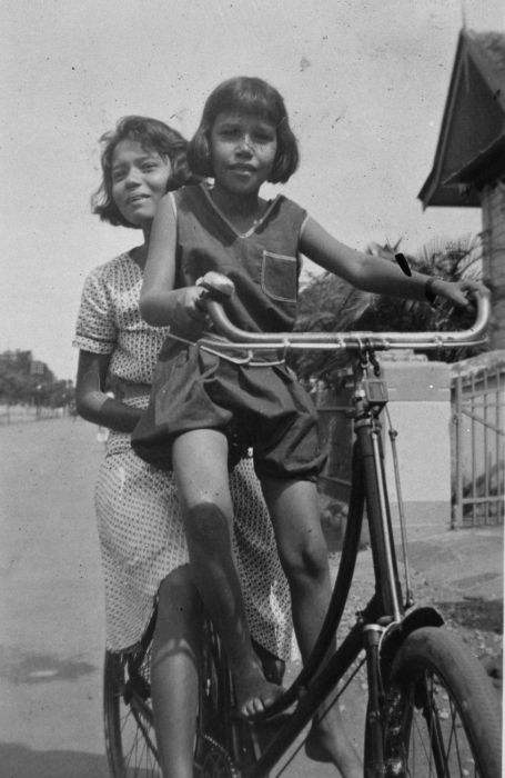 foto. Portret van twee Indo-Europese meisjes op de fiets